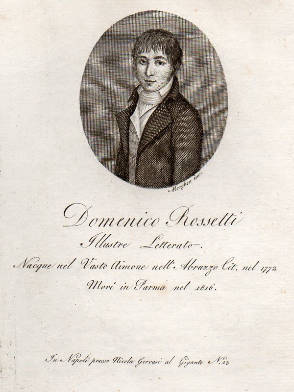 frontespizio tratto da una copia in mio possesso della biografia di Domenico Rossetti parte di: Domenico Martuscelli, Domenico Rossetti, in Biografia degli uomini illustri del regno di Napoli, vol. 5, Nicola Gervasi, 1818, pp. 577-584